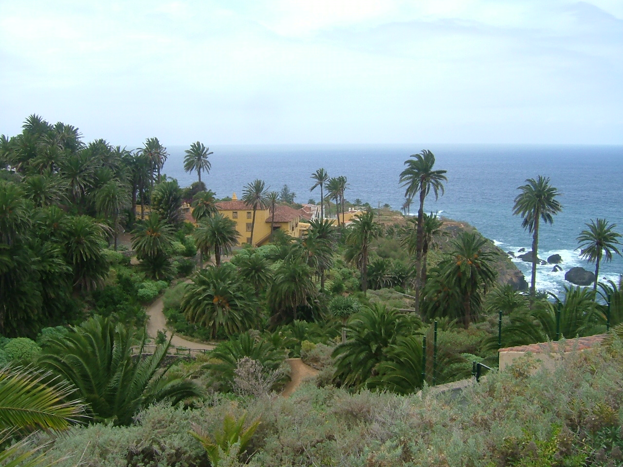 Vista parcial del palmeral de la Rambla de Castro y mansión de los Castro, (Los Realejos, Tenerife).